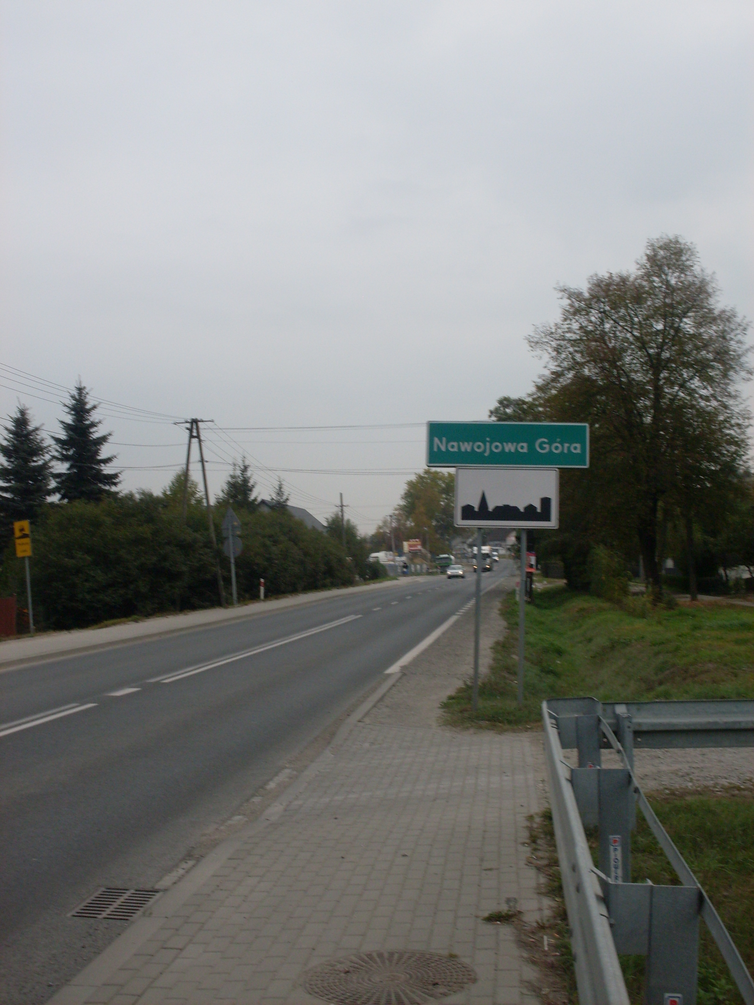 Nawojowa Góra od Krzeszowic, DK 79